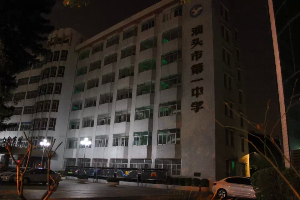 汕头一中老校夜景